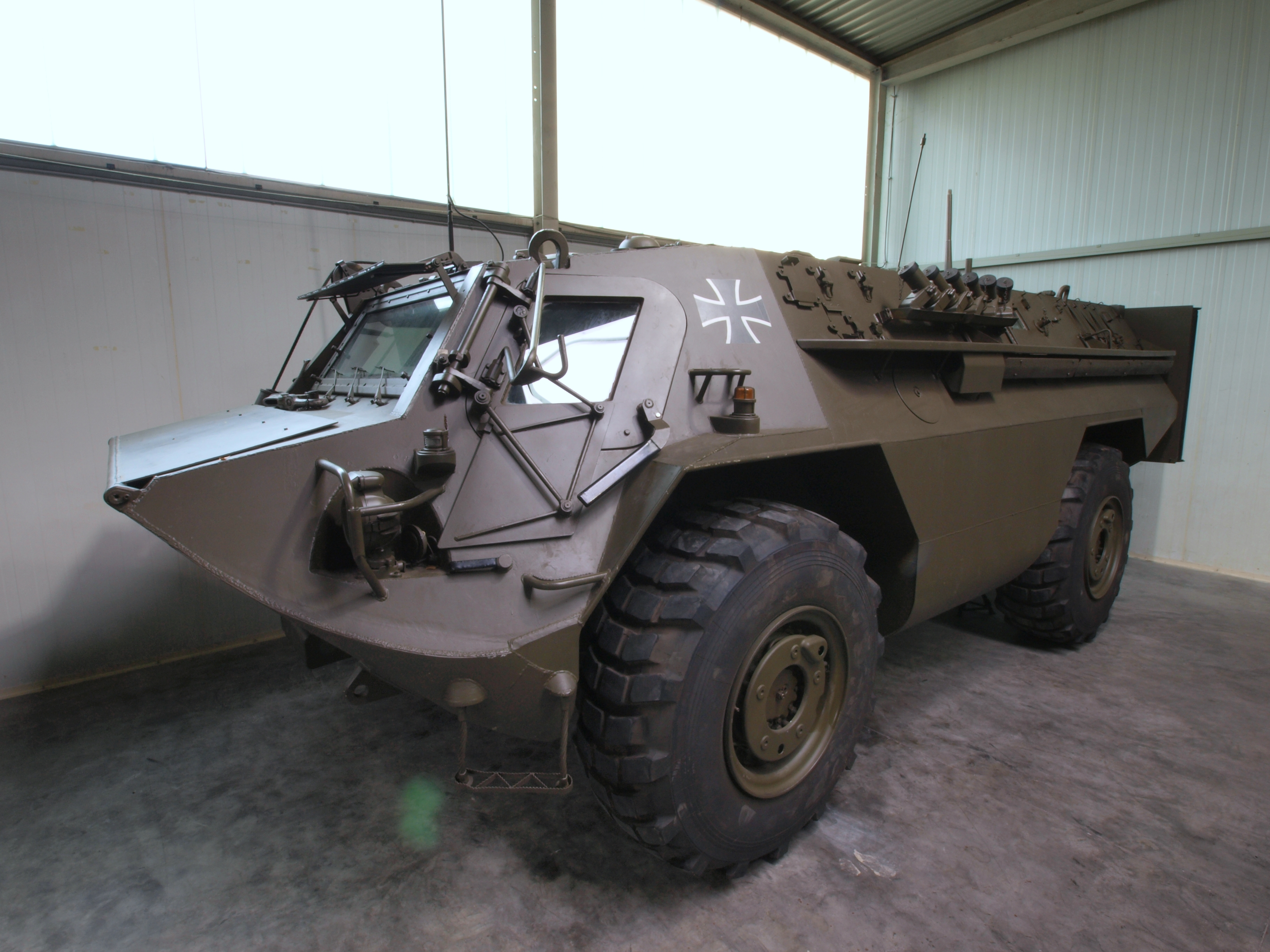 Amphibisches Pionier-Erkundungsfahrzeug (not TPZ Fuchs prototype!)